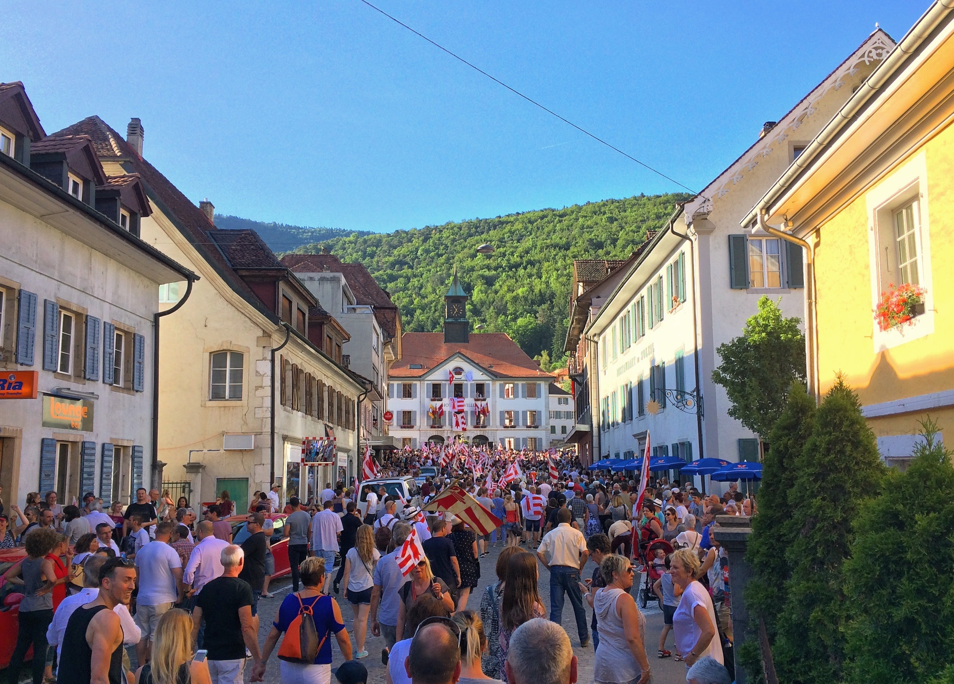 Le cortège des pro-jurassiens jusqu'à l'hôtel de ville lors du résultat favorable au canton du Jura, le 18 juin 2017.